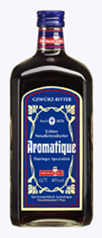 Eine Flasche Aromatique